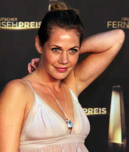 Felicitas Woll beim Deutschen Fernsehpreis 2012